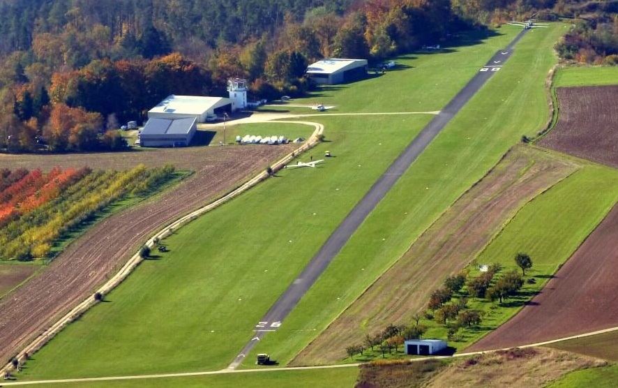 Flugplatgz Hetzleser Berg von Osten